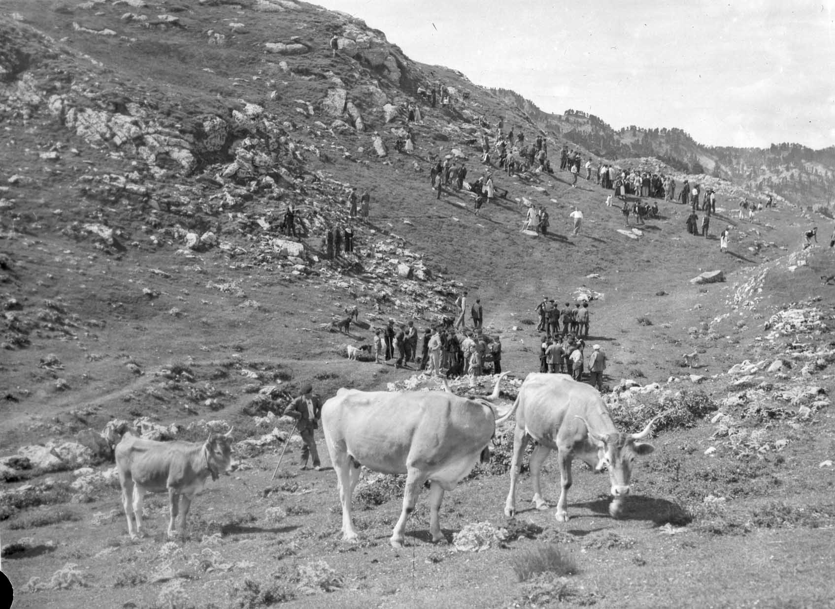 Tributo de las Tres Vacas. Eligiendo las vacas